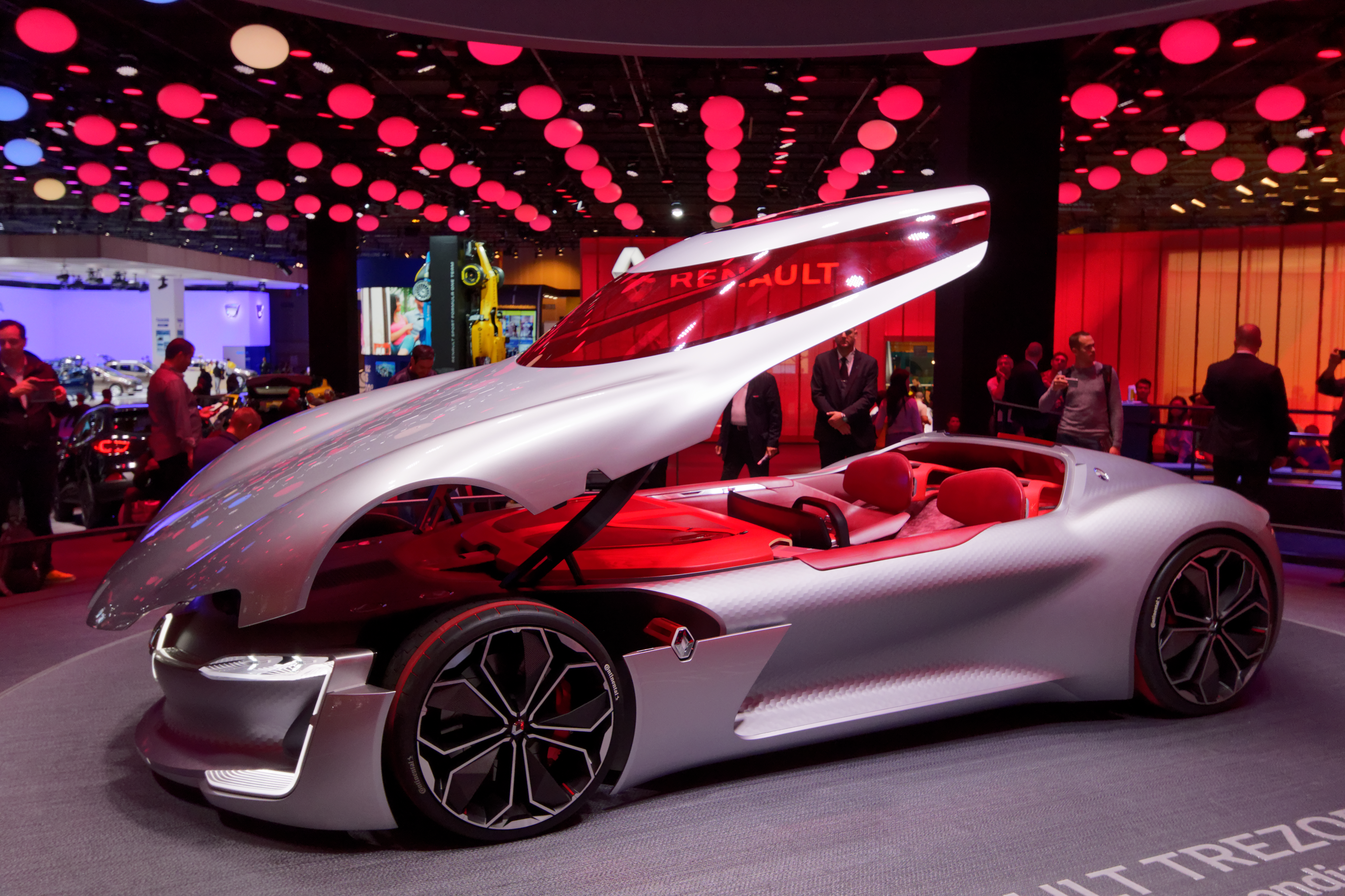 Une Renault Trezor présentée lors du mondial de l'automobile de Paris 2016.